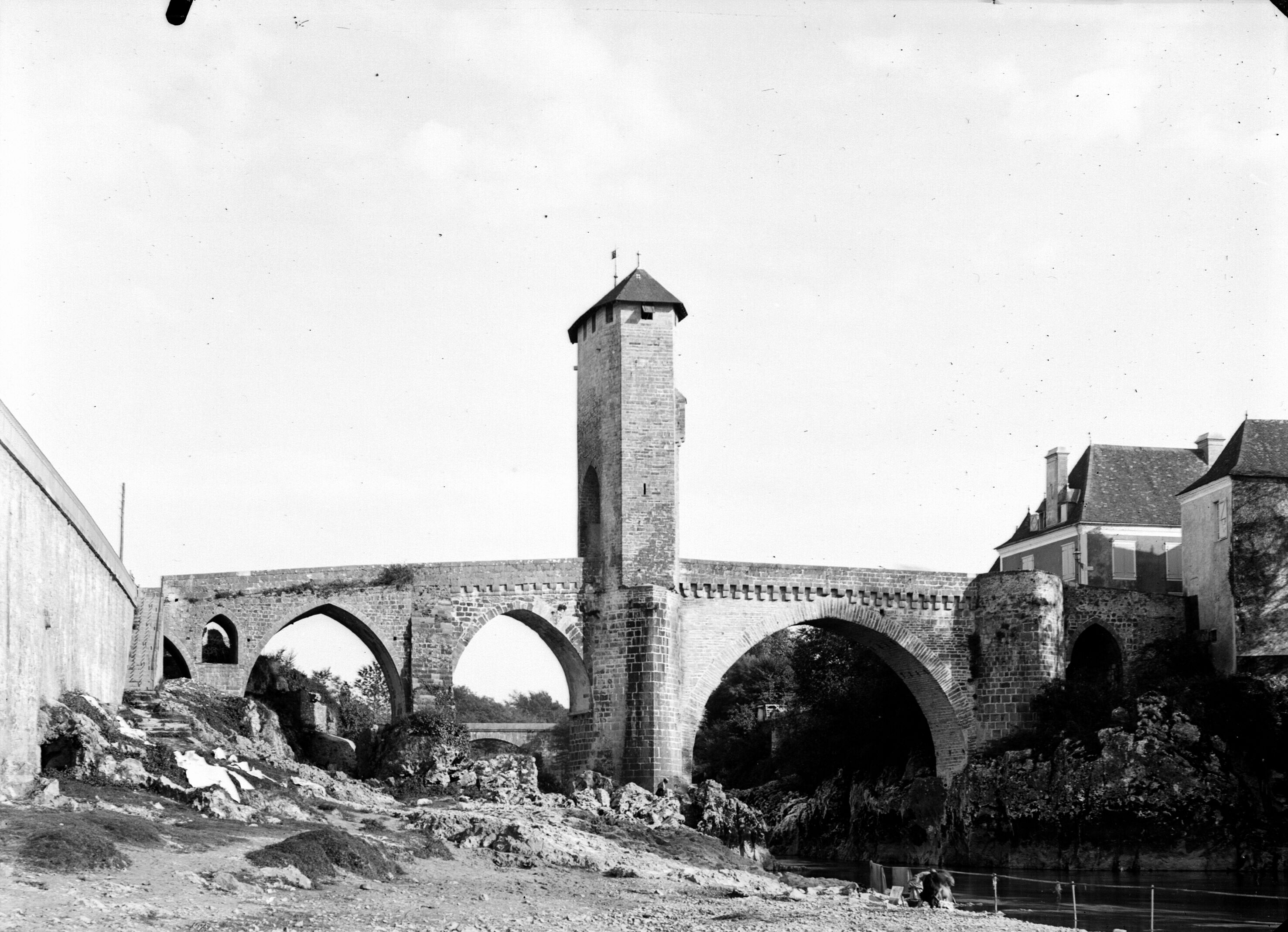 Fonds Trutat - Photographie ancienne Cote : TRU B 291 Localisation : Fonds ancien (S 30) Original non communicable Titre : Pont portique, Orthez Auteur : Trutat, Eugène Rôle de l’auteur : Photographe Lieu de création : Orthez (Pyrénées-Atlantiques) Date de création : 1859-1910 [entre] Mesures : : 13 x 18 cm Observations : Notes manuscrites Trutat : "Obj[ectif] hémisph[érique]". Mot(s)-clé(s) : -- Pont -- Pierre -- Arche -- Tour -- Porte -- Escalier -- Maison -- Rivière -- Rive -- Arbre -- Orthez (Pyrénées-Atlantiques) -- Pont-Vieux (Orthez) -- Pau, Gave de (France ; rivière) -- Béarn (Pyrénées-Atlantiques ; vicomté) -- Pyrénées (France) -- 19e siècle, 2e moitié -- 20e siècle, 1e quart Médium : Photographies -- Négatifs sur plaque de verre -- Noir et blanc -- Vues d'architecture Bibliothèque de Toulouse. Domaine public